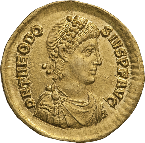 Феодосий I Великий (379—395). Солид. Ок. 383—388 гг. Константинополь. Оффицина Δ. Аверс. Бюст Феодосия I Великого в панцире и плаще, вправо; на голове жемчужная диадема.